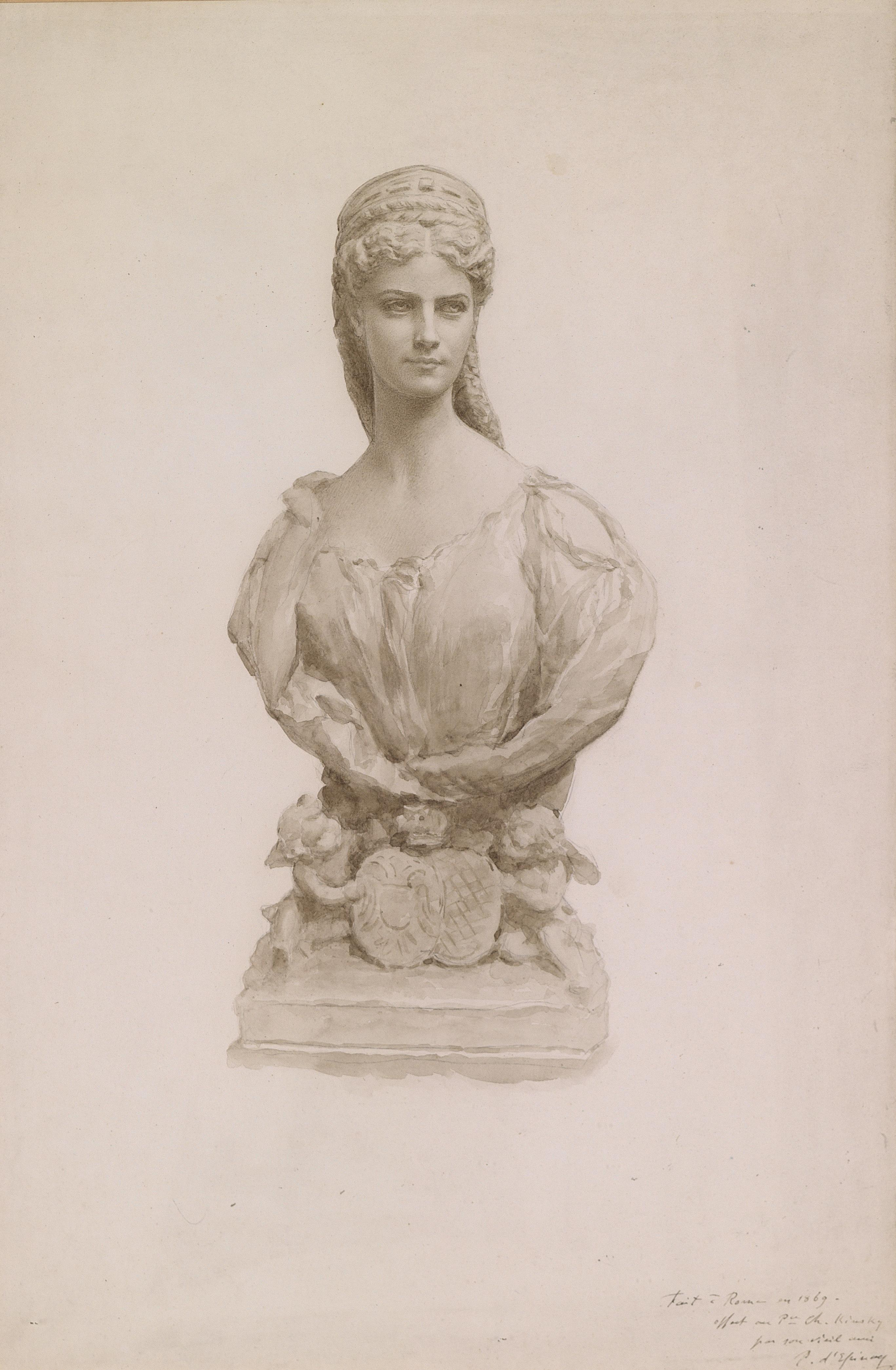 Porträtbüste der Kaiserin Elisabeth von Österreich. Signiert und datiert "Fait à Rome en 1869. offert au P. Ch. Kinsky par un vieux ami P. d'Epinay", Bleistift und Sepiaaquarell auf Papier, 43 x 18 cm